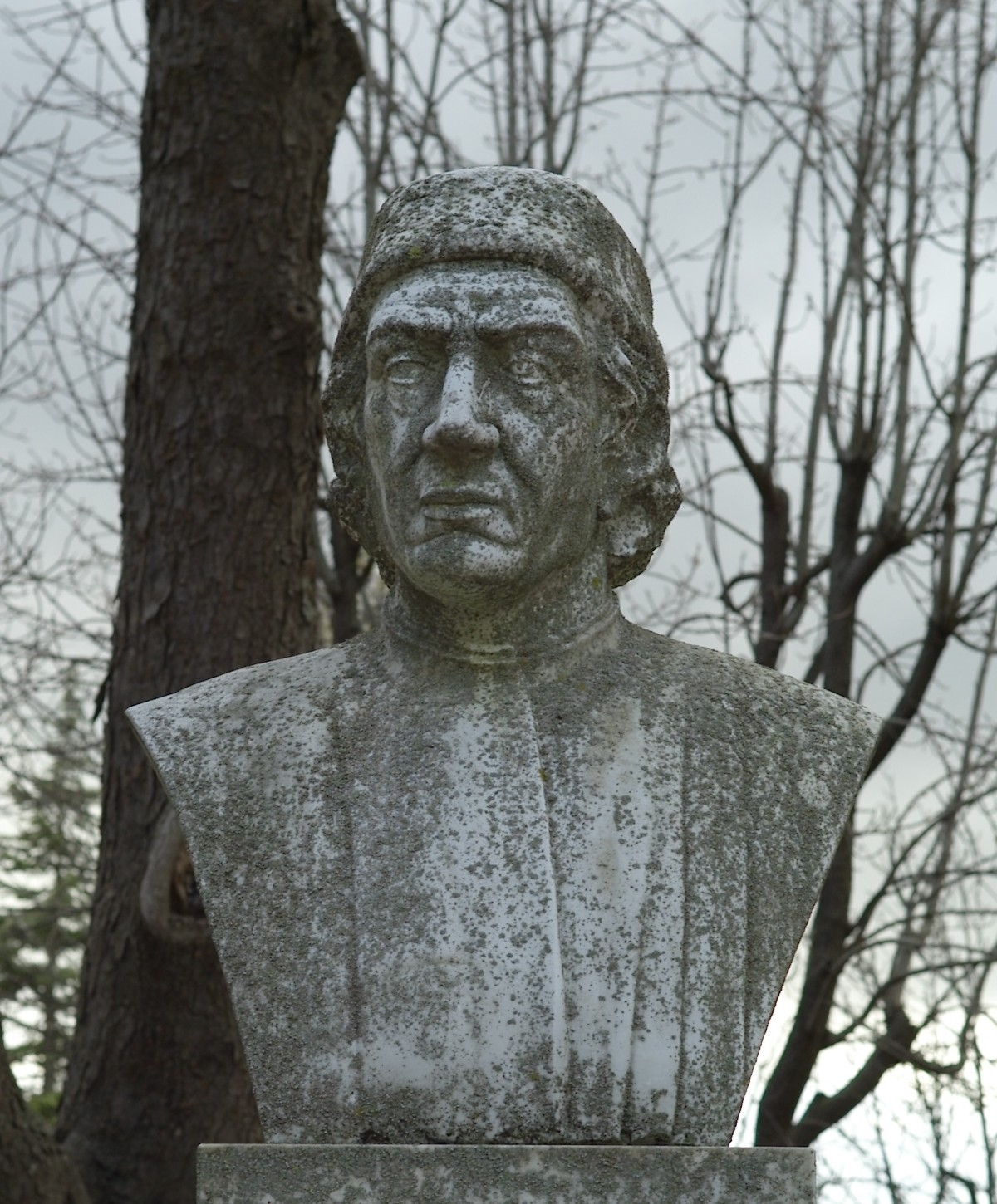 Il busto di Giovanni Santi a Urbino.